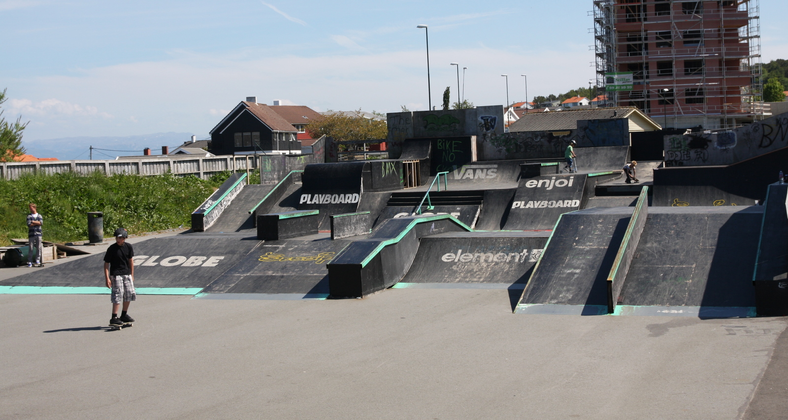 Tasta skateanlegg